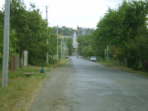 село Кленовець Мукачевського району